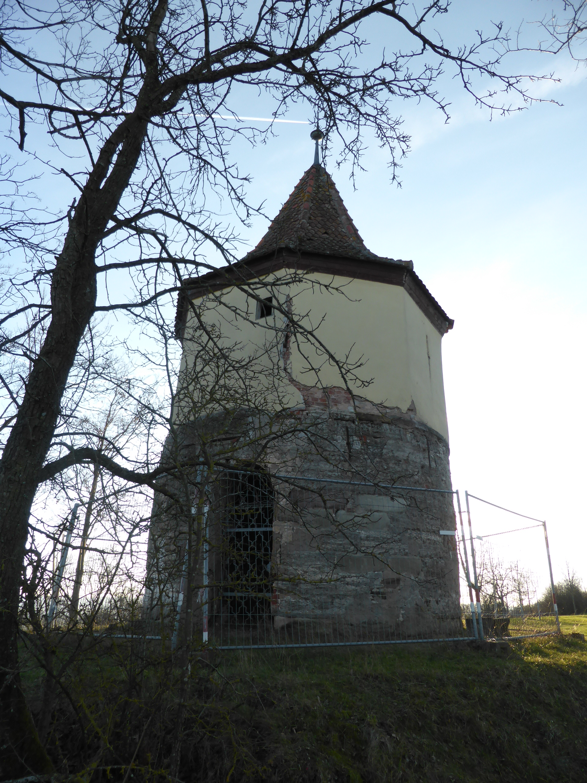 Der etwas baufällige knapp 600 Jahre alte Weinturm auf dem Weinberghügel in Bad Windsheim. Aufnahme vom Dezember 2015.